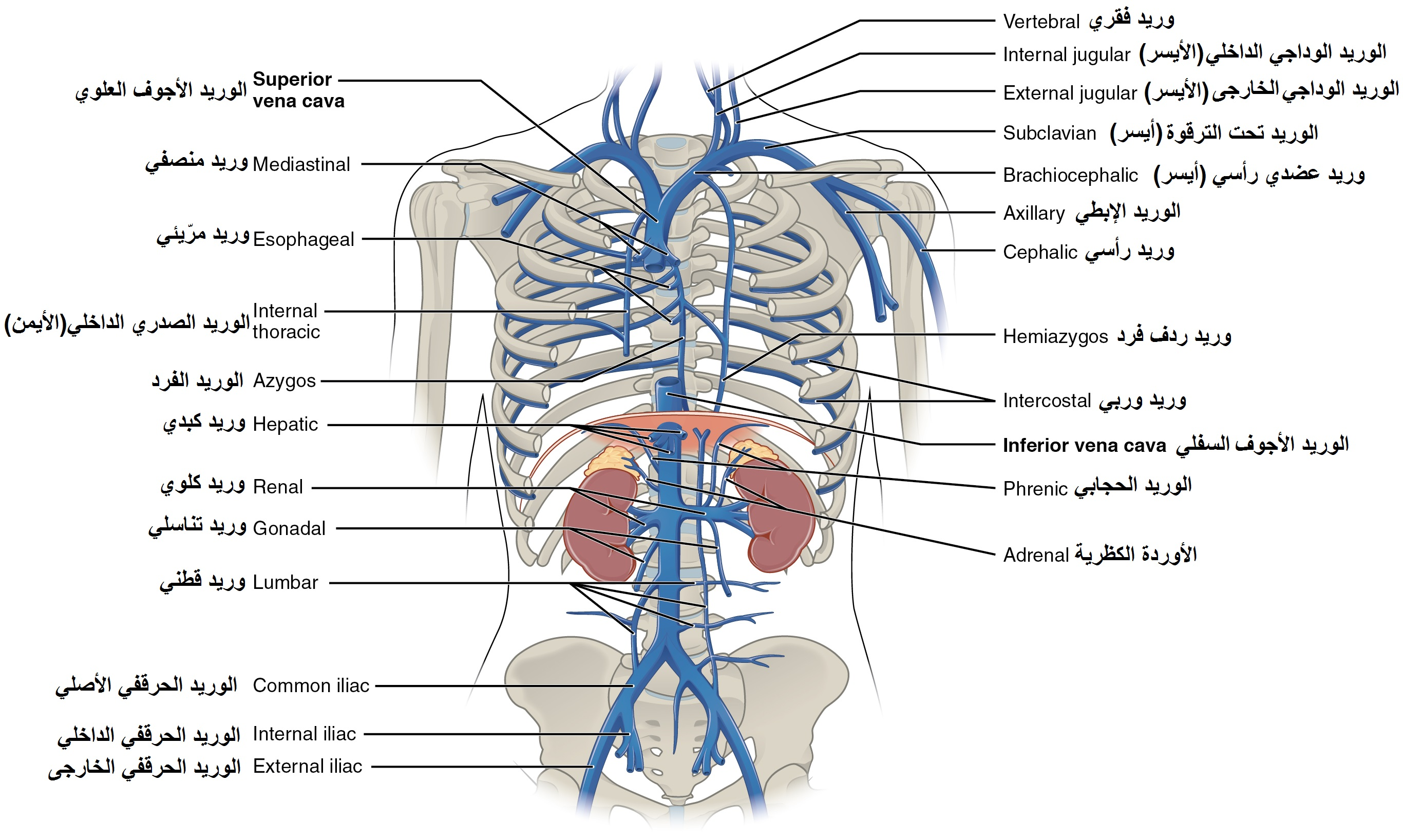 أوردة مناطق الصدر والبطن تجمع الدم من المنطقة فوق الحجاب الحاجز، وتعيده إلى الأذين الأيمن عن طريق الوريد الأجوف العلوي.